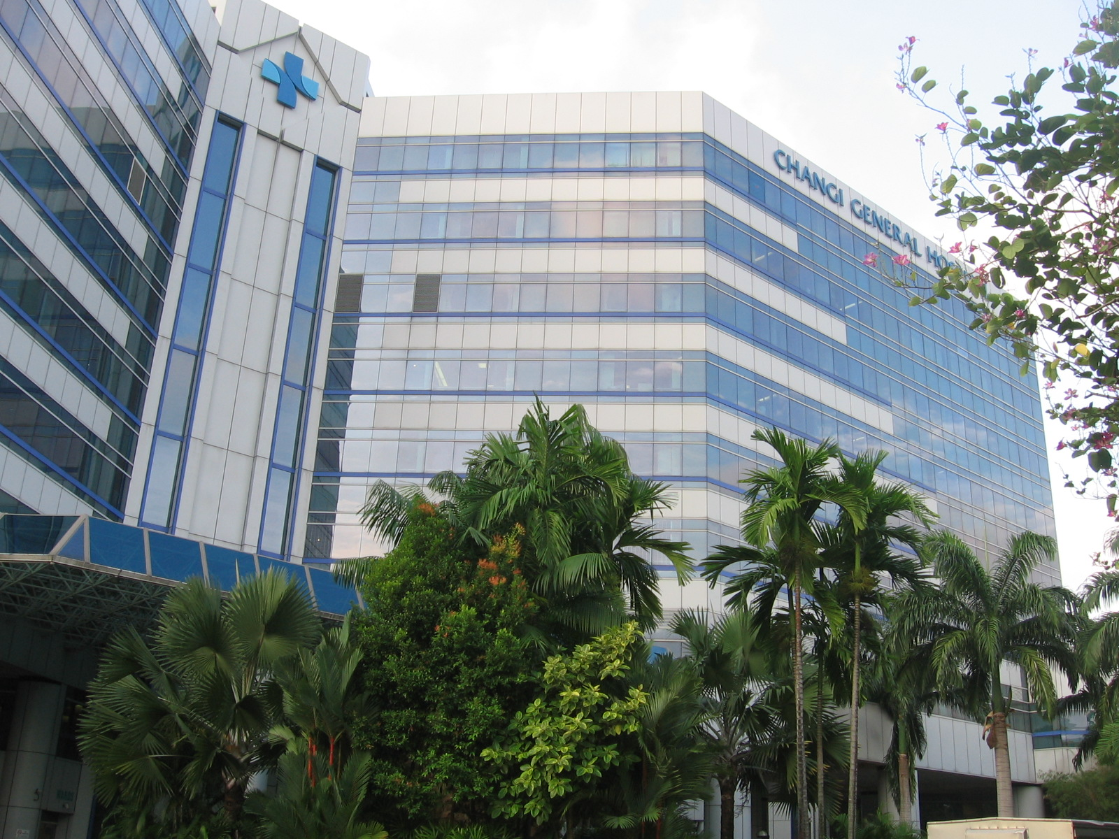 Changi General Hospital, Singapore